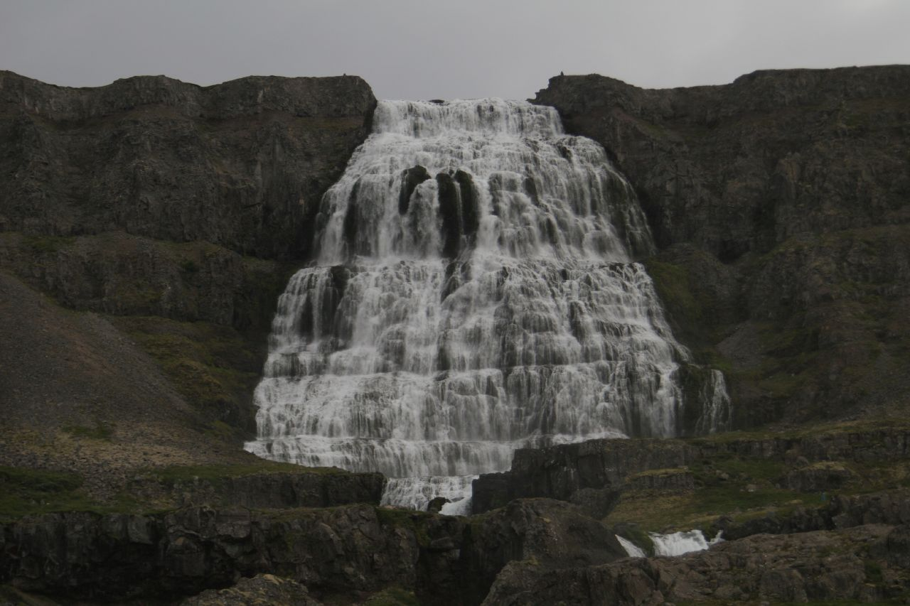 Dynjandi waterfalls, Iceland